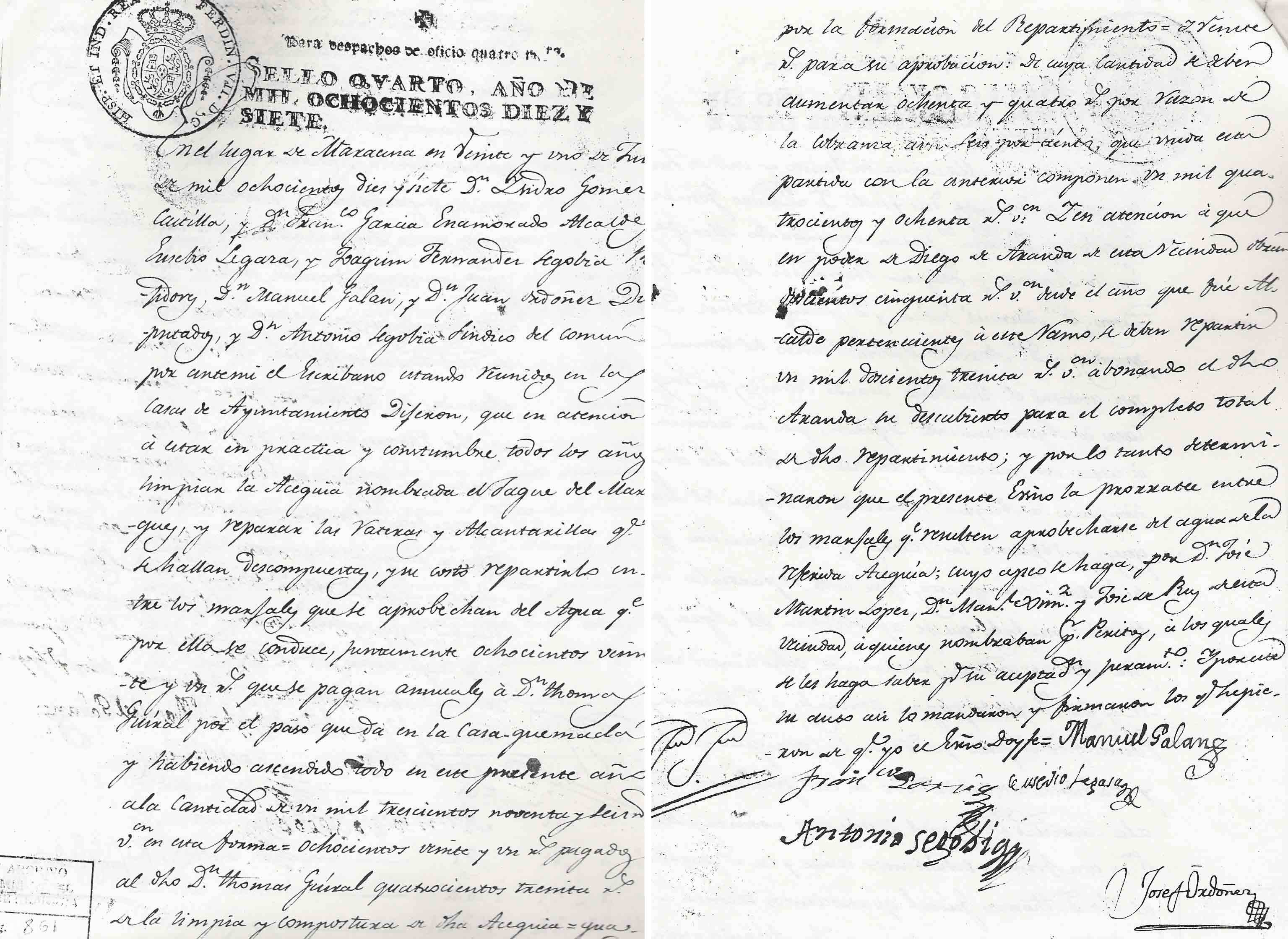 Copia digitalizada de un documento de 1817, antes del asecenso a Municipio de MAracena por el que el Concejo Municipal realiza el reparto del gasto de la limpieza los algibes entre todo el vecindario. Es un documento de primera magnitud pues es el primer censo vecinal conocido de la localidad con nombres y apellidos.